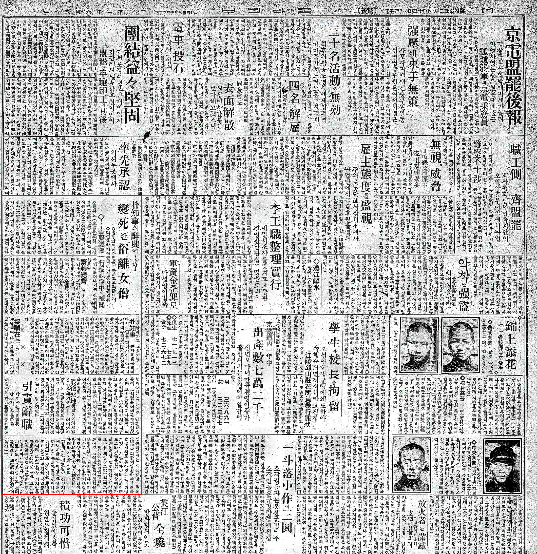 1925년 속리사 여승 변사사건 보도 기사